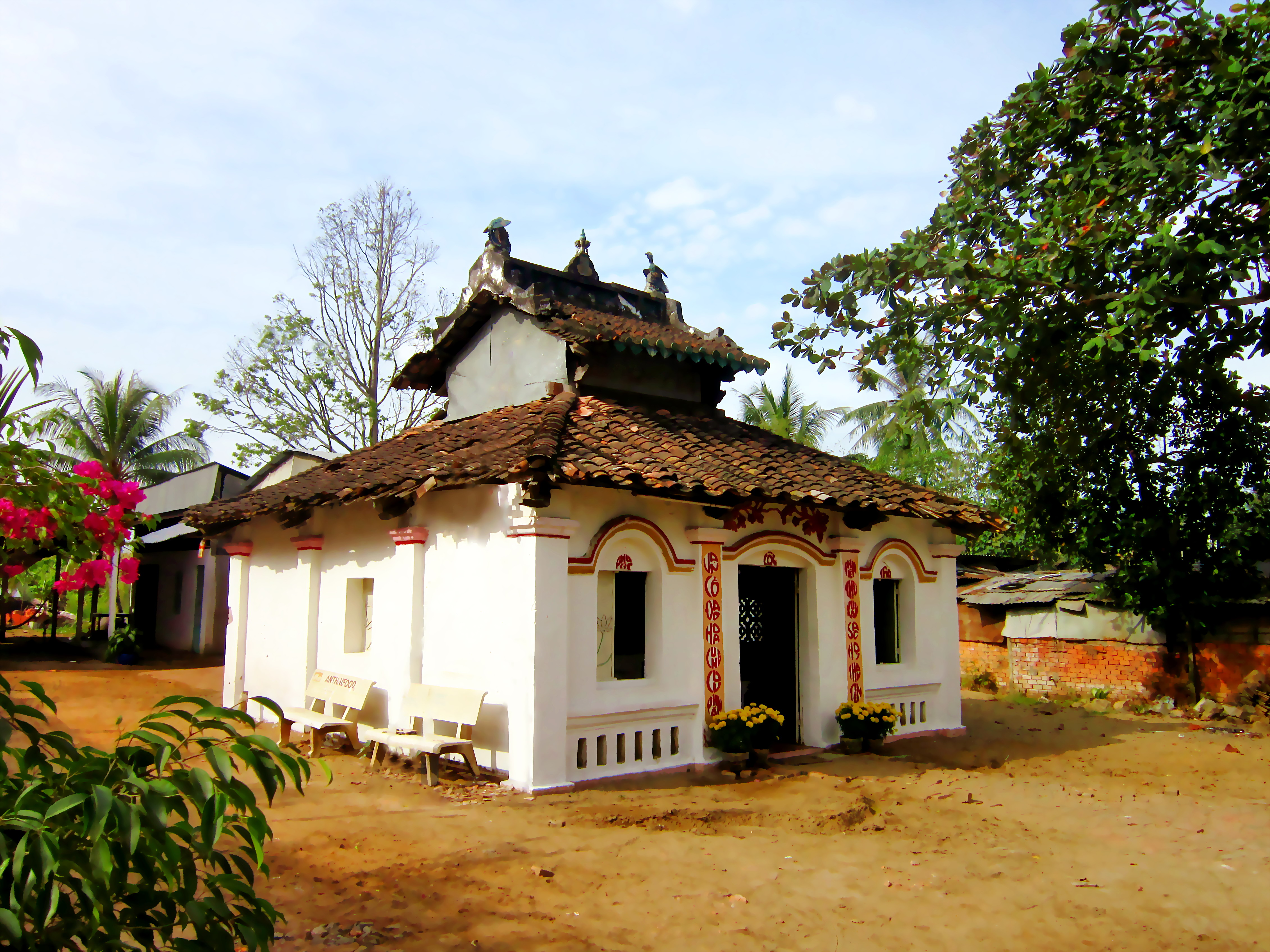 Miếu cổ thờ bà Chúa Xứ ở phường Thường Thạnh, quận Cái Răng, thành phố Cần Thơ, Việt Nam.